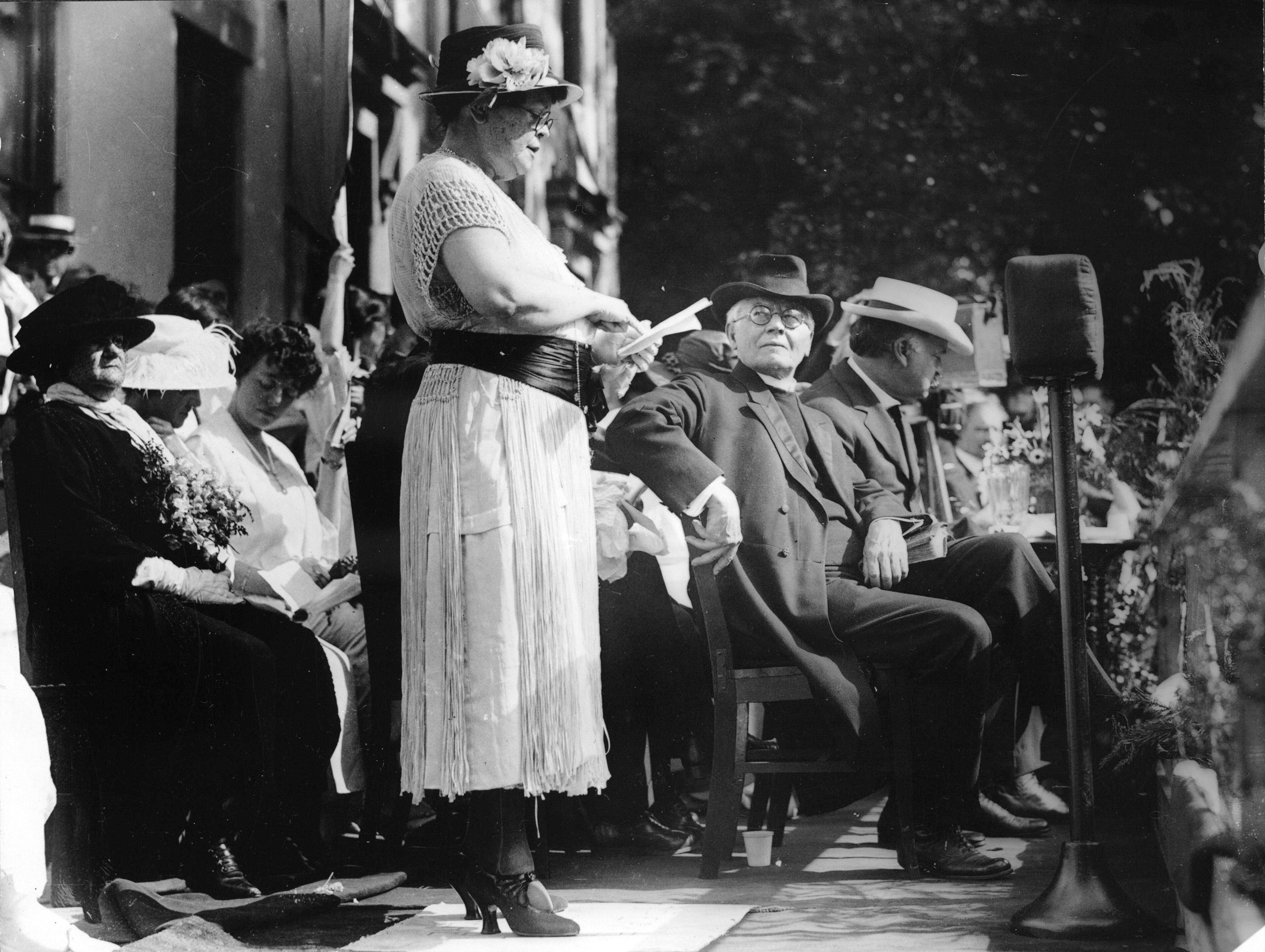 Alva Vanderbilt Belmont (1853-1933)